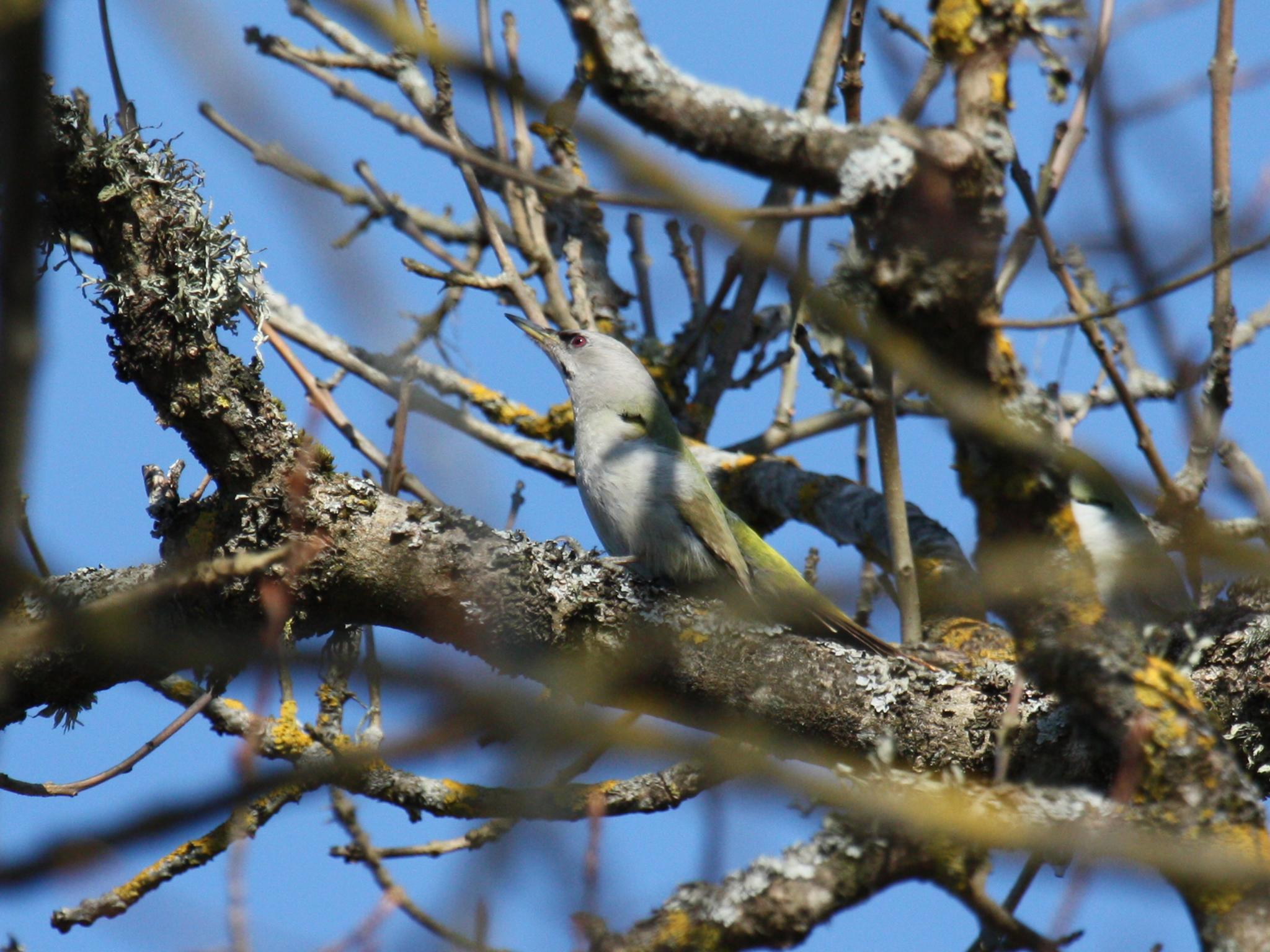 Weiblicher Grauspecht. Estonia.